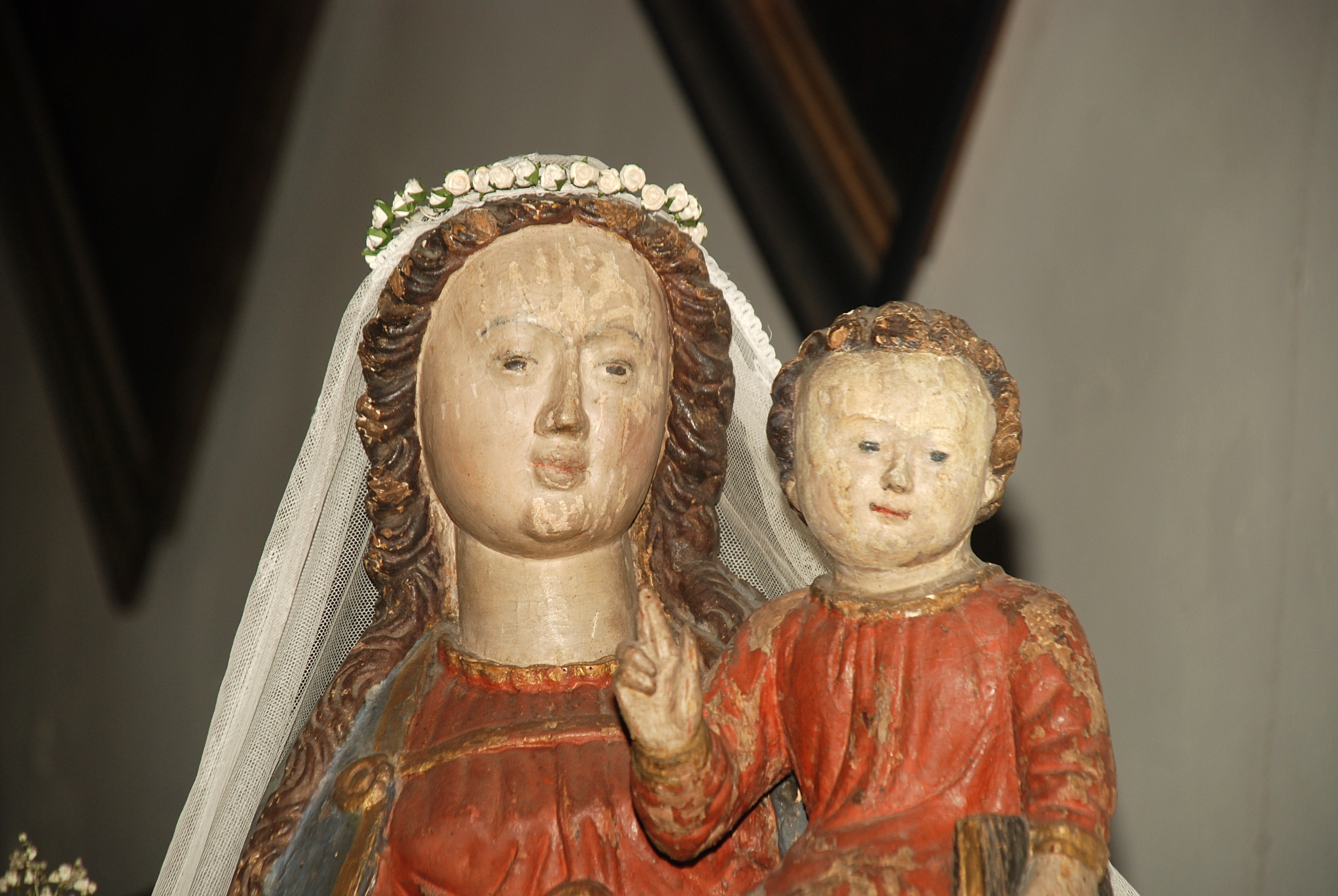 Belgique - Bousval - Notre-Dame du Try-au-Chêne